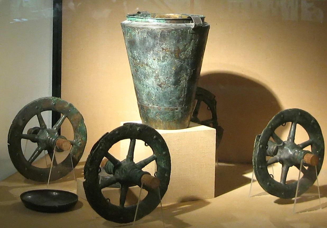 Char cultuel utilisé entre le VIIIe et le VIe siècle avant J.-C. découvert en 1888 à la Côte-Saint-André - Musée gallo-romain de Lyon Lieu : Lyon, France Date : 2006 Author : Pline photo ou réalisation (schéma) personnelle